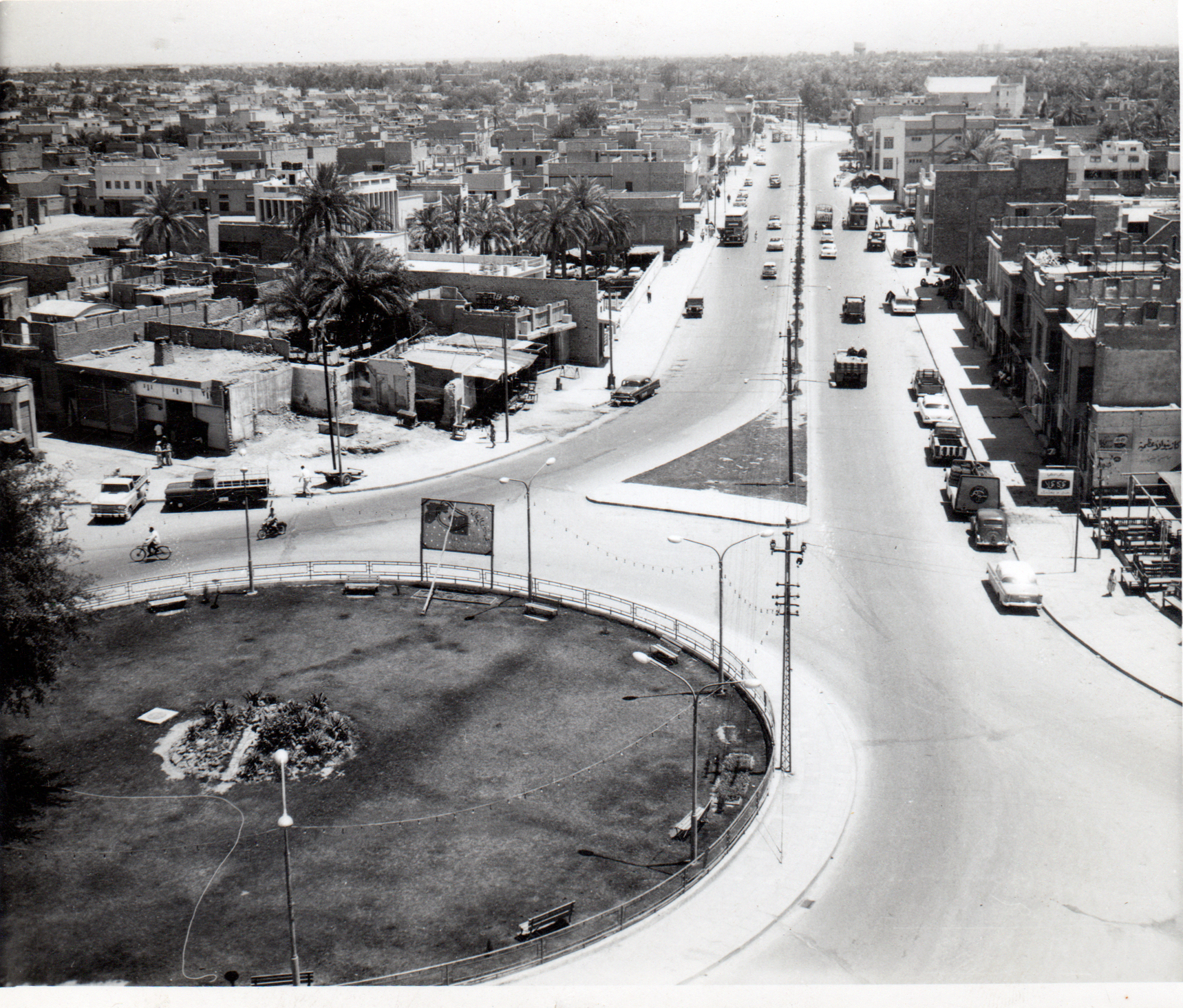 مشهد لمنطقة الأعظمية في بغداد والتقطت الصورة من أعلى برج الساعة الواقع في ساحة جامع الإمام الأعظم أبي حنيفة، عام 1960